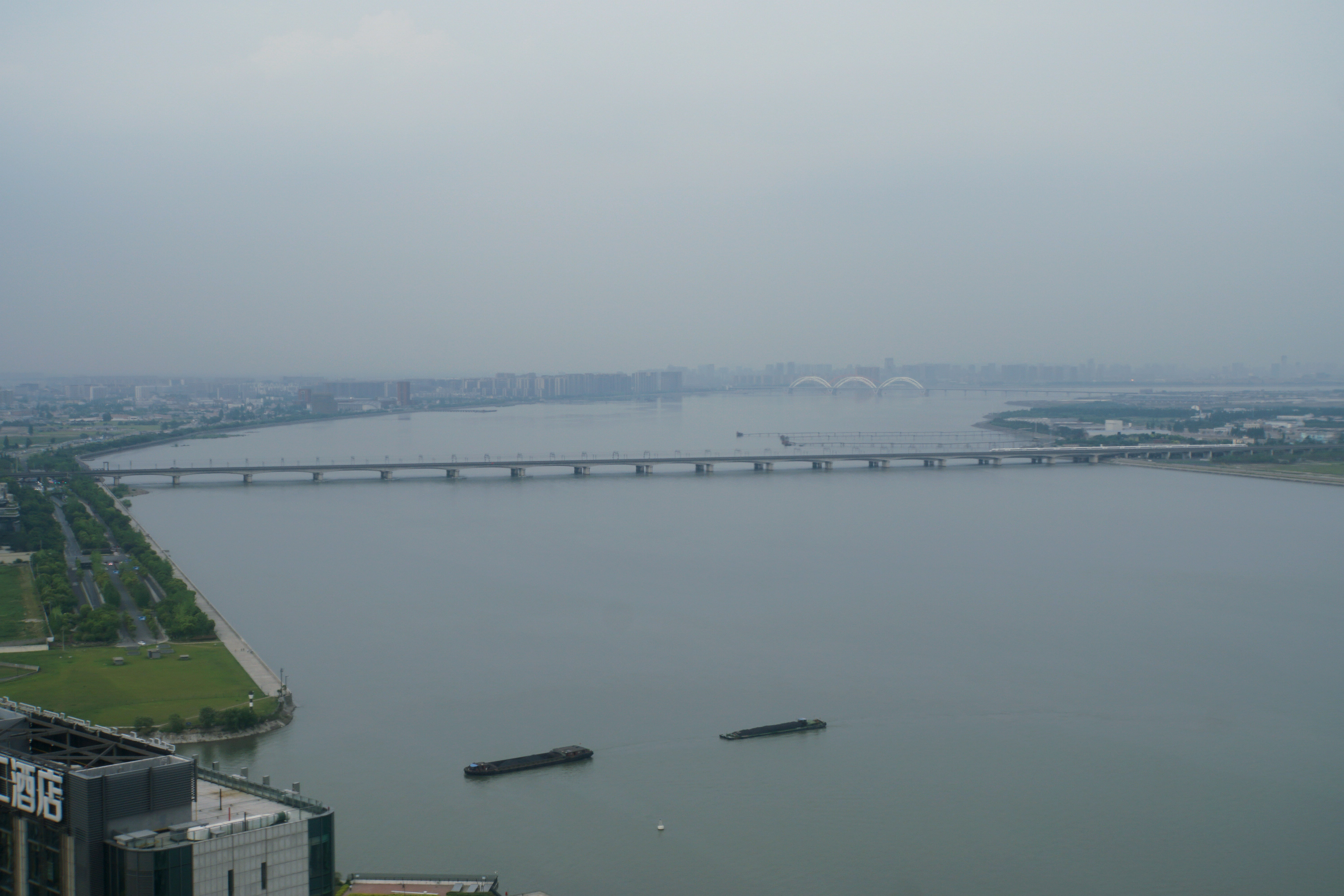 从远处俯瞰钱江二桥和钱江铁路新桥